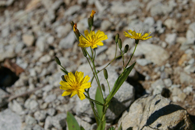 クモマニガナ（北アルプス・穂高岳）Ixeris dentata var. kimurana (Mt. Hotakadake, Northern Alps of Japan)